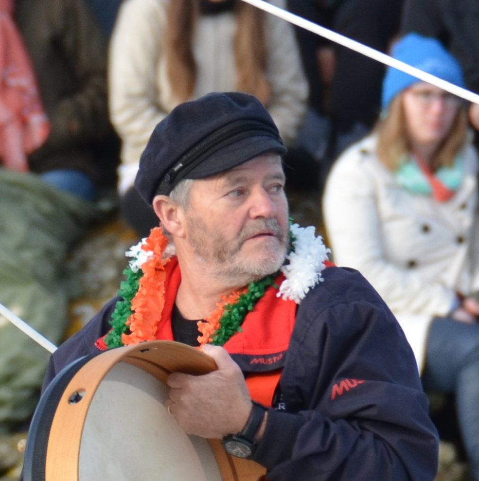 Enda O'Coineen au départ du Vendée Globe 2016-2017